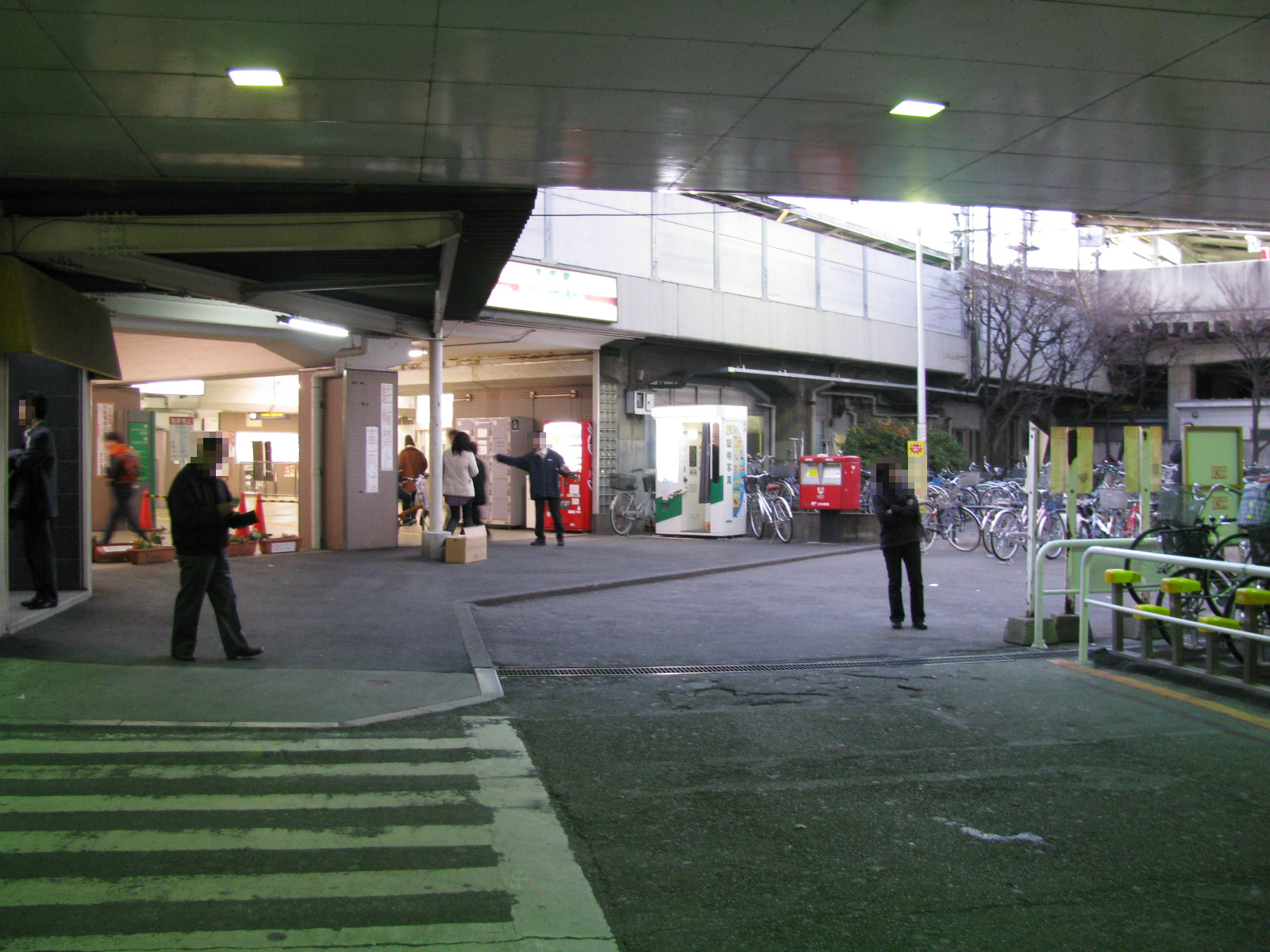 東武鉄道曳舟駅